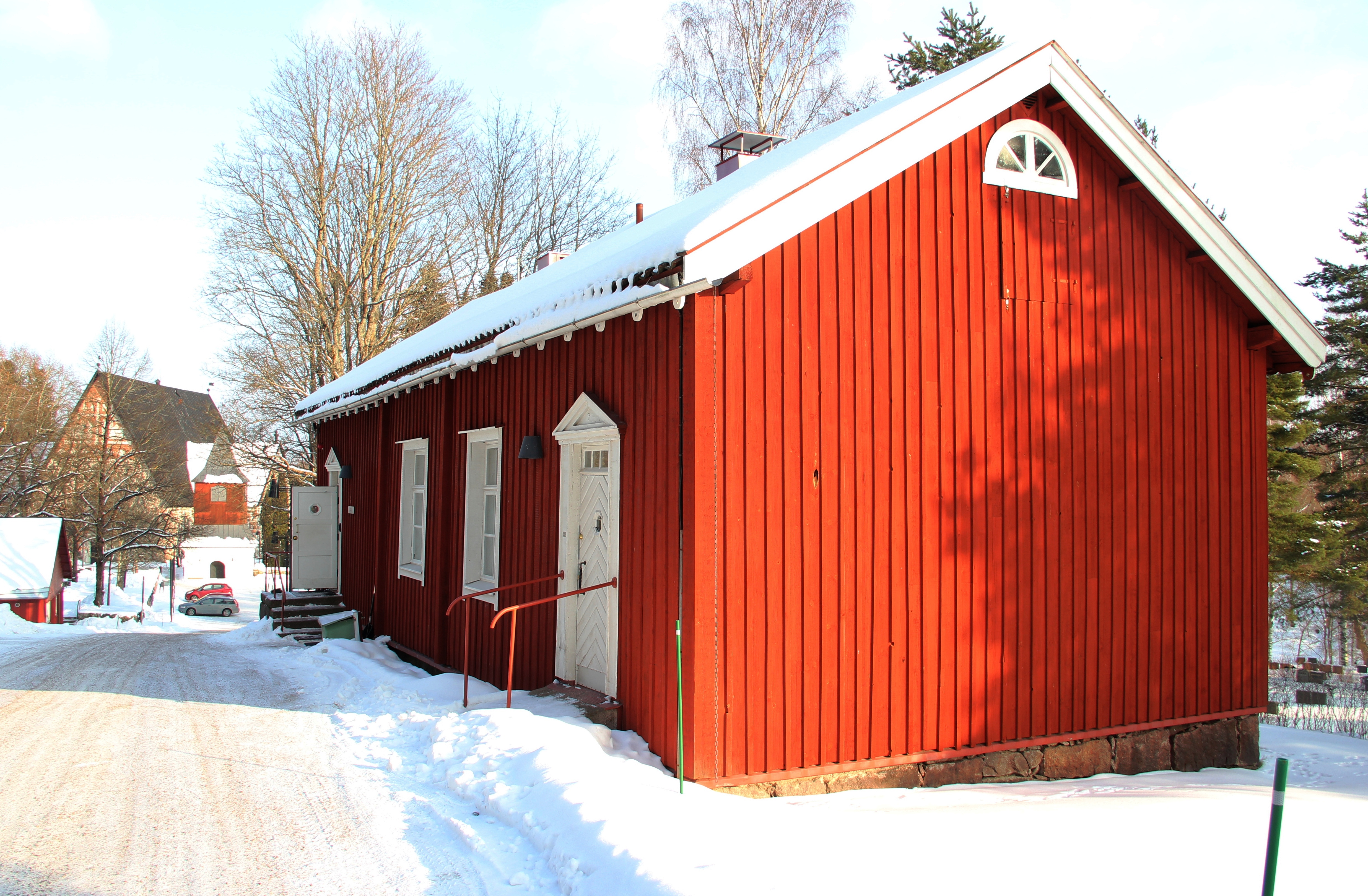 Pitäjäntupa, seurakunnan pieni juhlatila, Kirkonmäki, Espoo